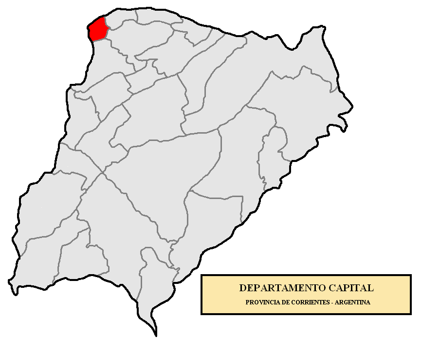 Localización del Departamento Capital, en la provincia de Corrientes, Argentina.